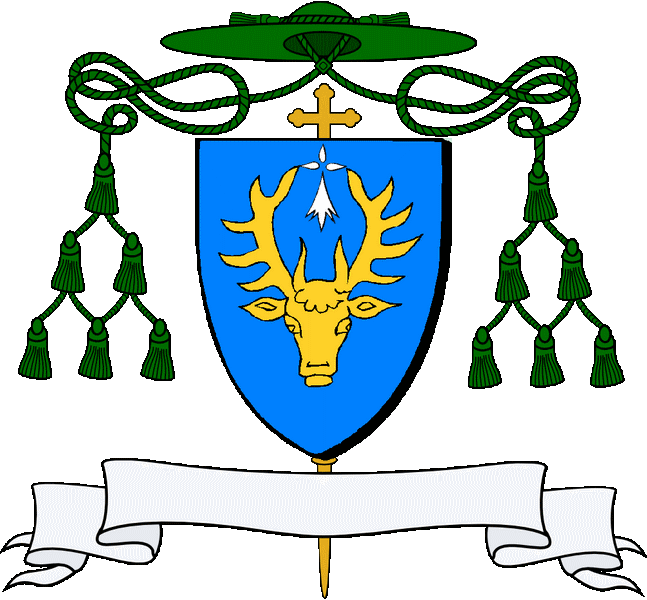 En glazur e arbenn c'harv en aour leinet gant un erminig en arc'hant